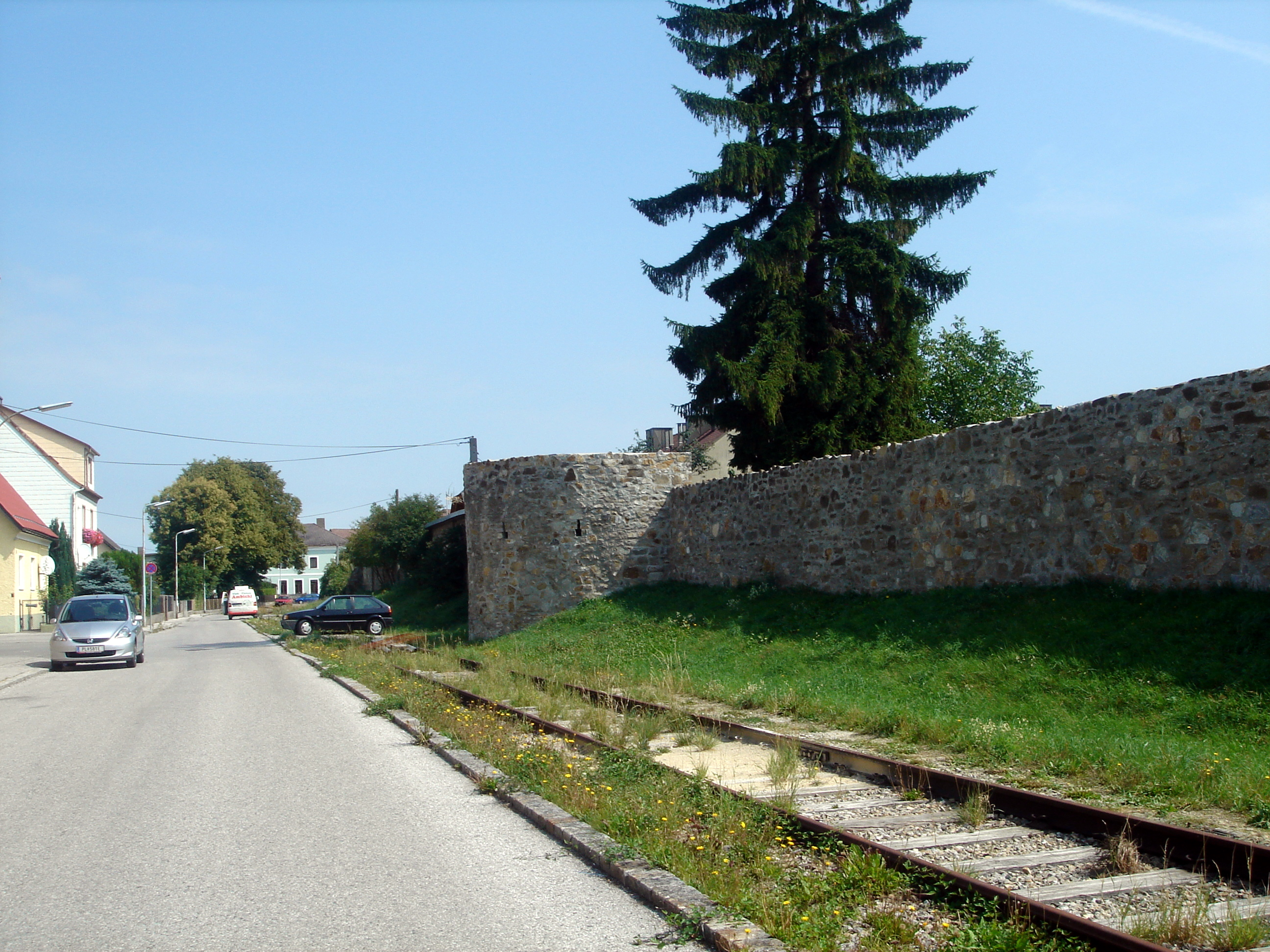 Die Reste der alten Stadtmauer in Wilhelmsburg